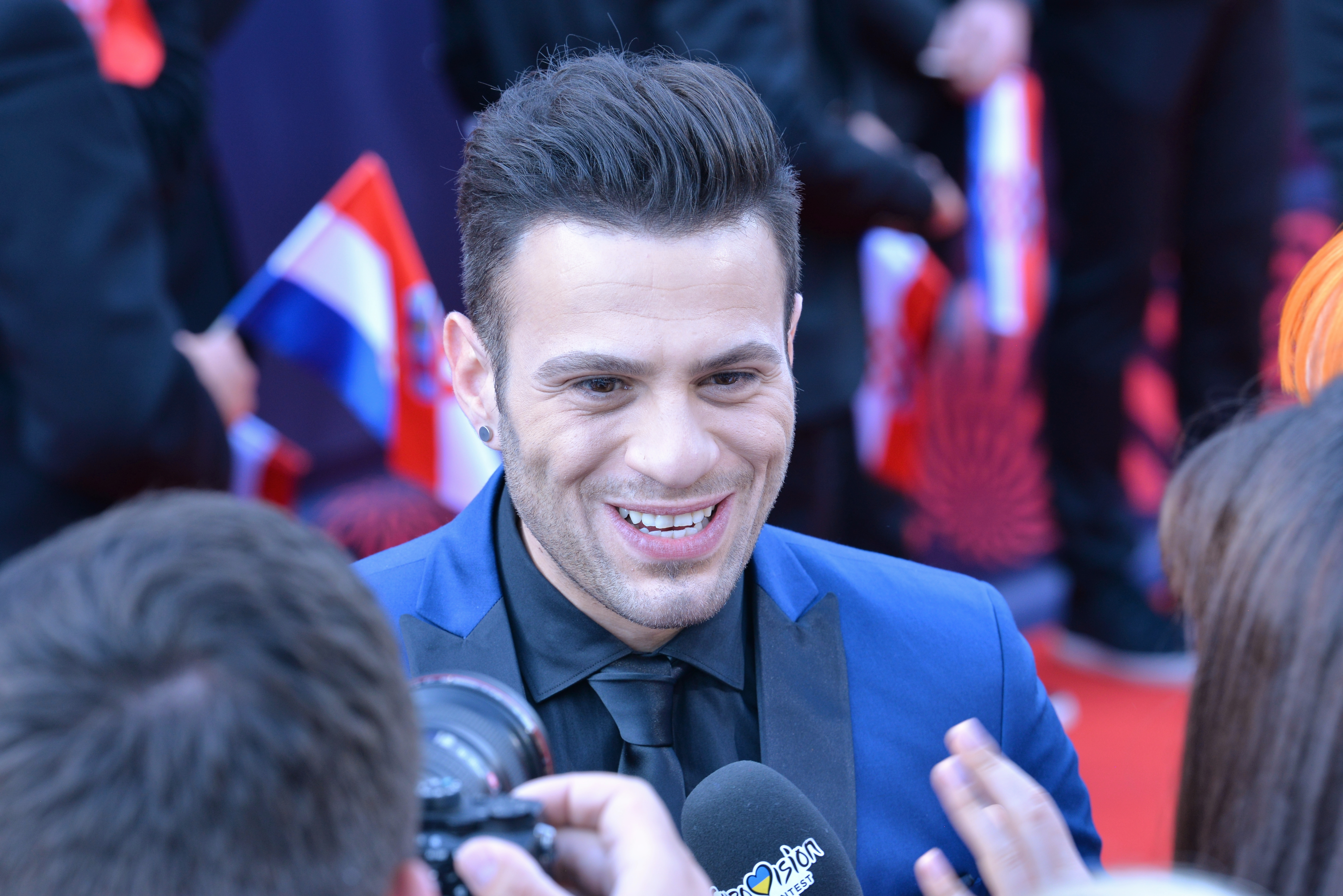 Кіпрський співак вірменського походження Овіґ Демірчян на церемонії відкриття Євробачення 2017 у Києві